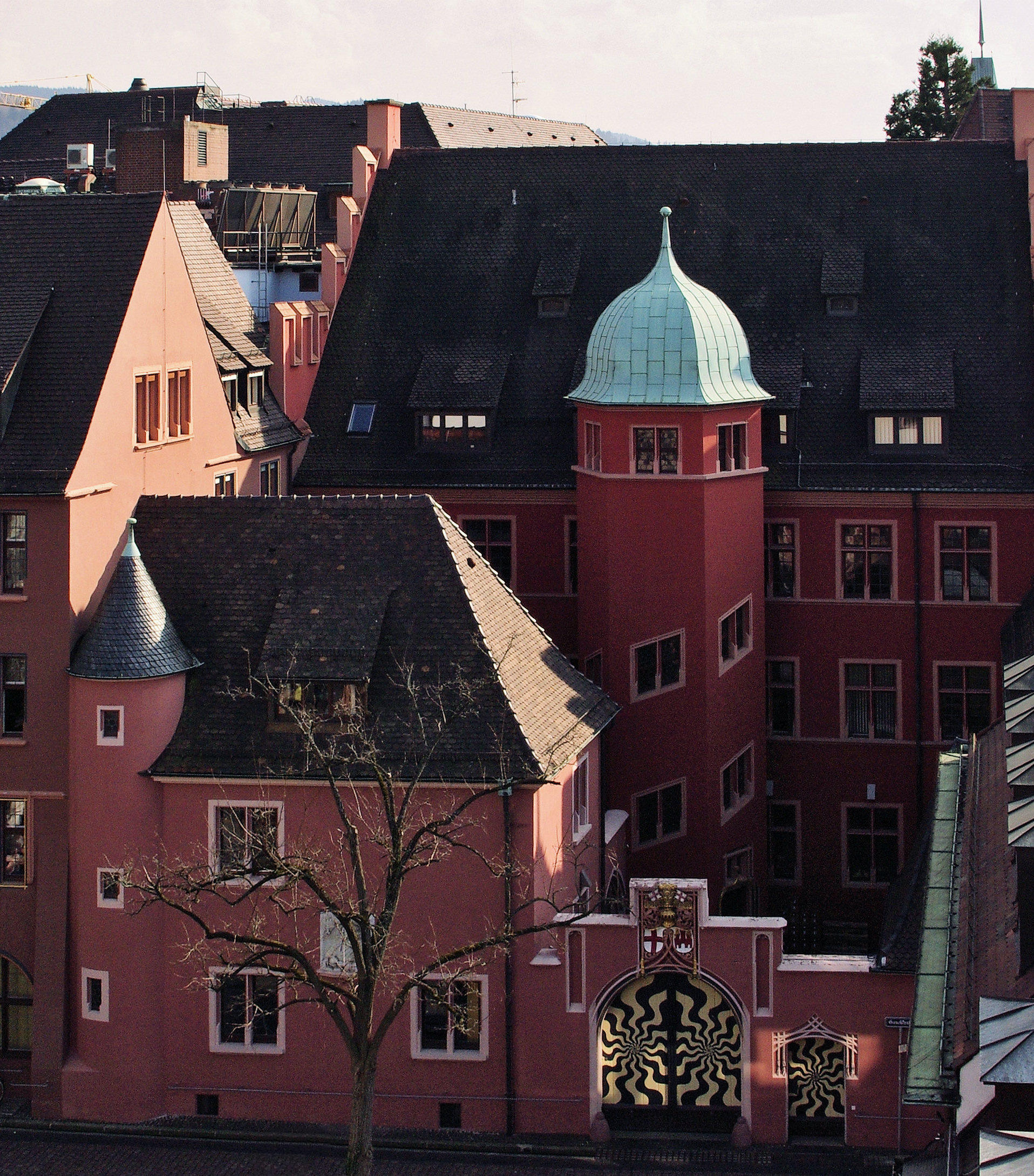 Historische Häuser in Freiburg Haus zum Walfisch Rückseite